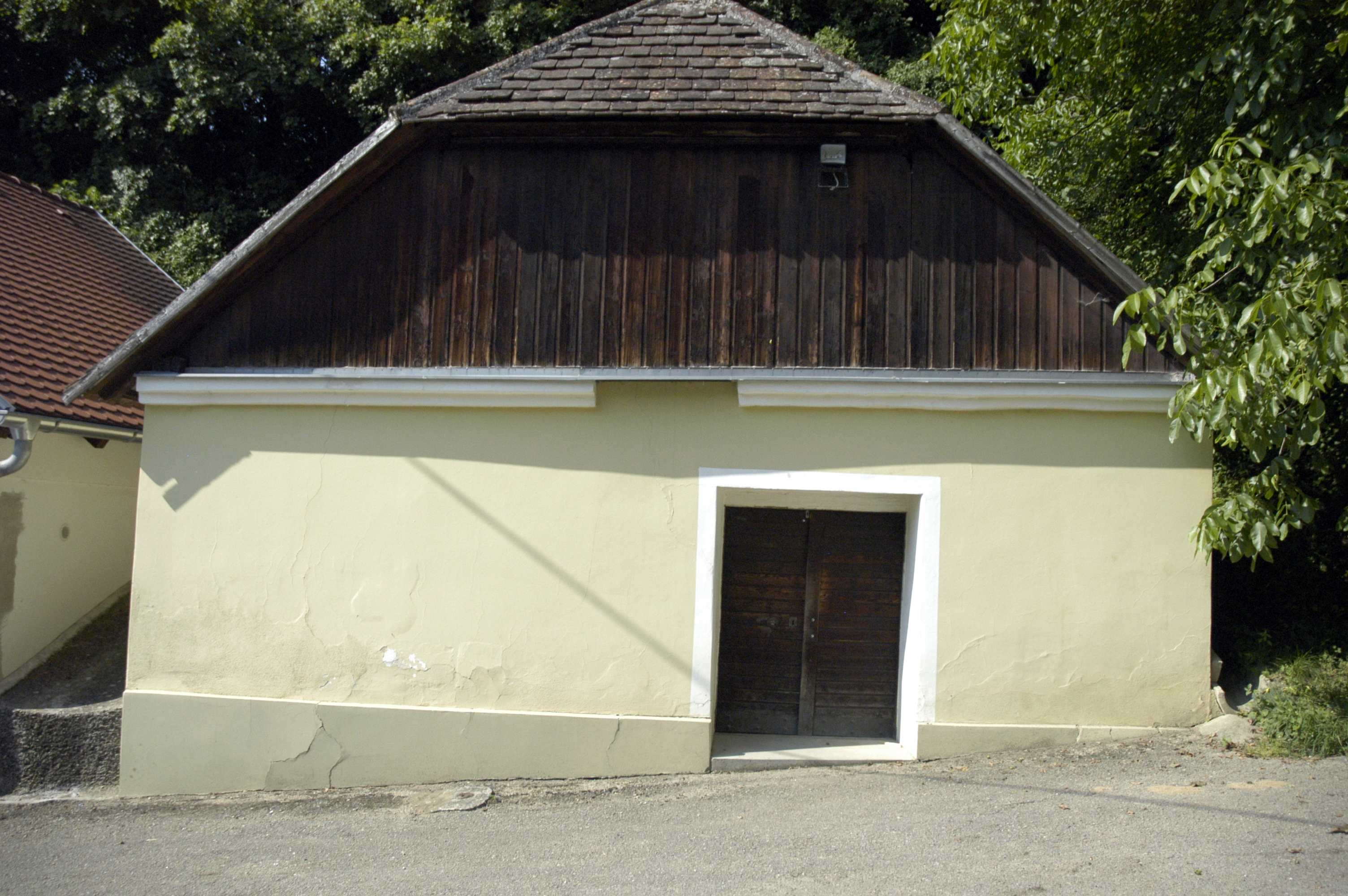 Keller Winkler in der Mühlbergkellergasse in Sitzendorf an der Schmida